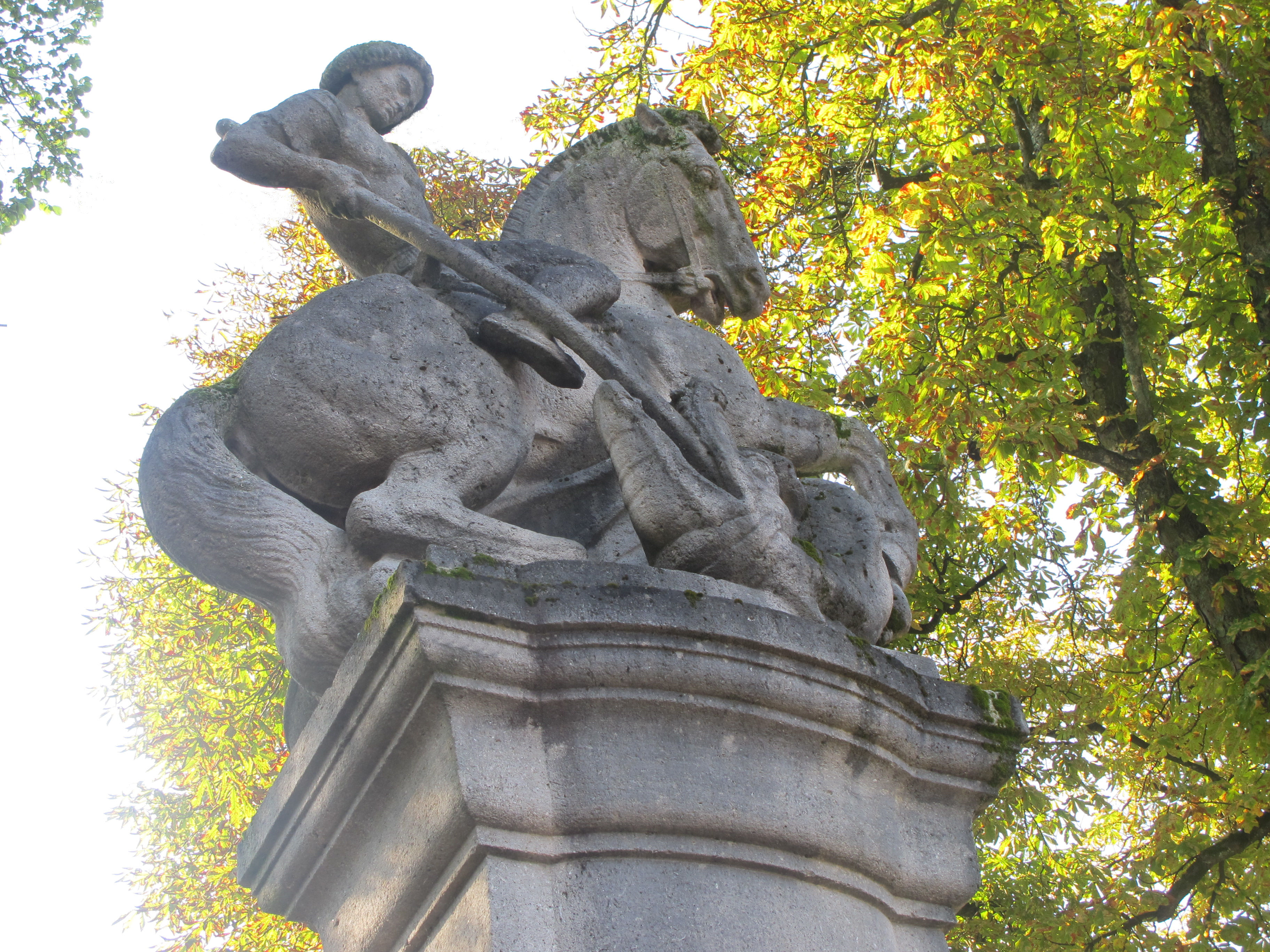 Kriegerdenkmal in Eupen, Werthplatz; Skulptur des Heiligen Georg zu Pferd als Drachentöter; 1912 von Bildhauer Rudolf Henn (München); unter Denkmalschutz